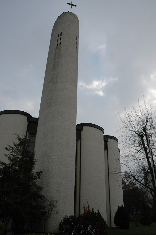 Katholische Kirche Heilig Kreuz im Erlanger Stadtteil Bruck